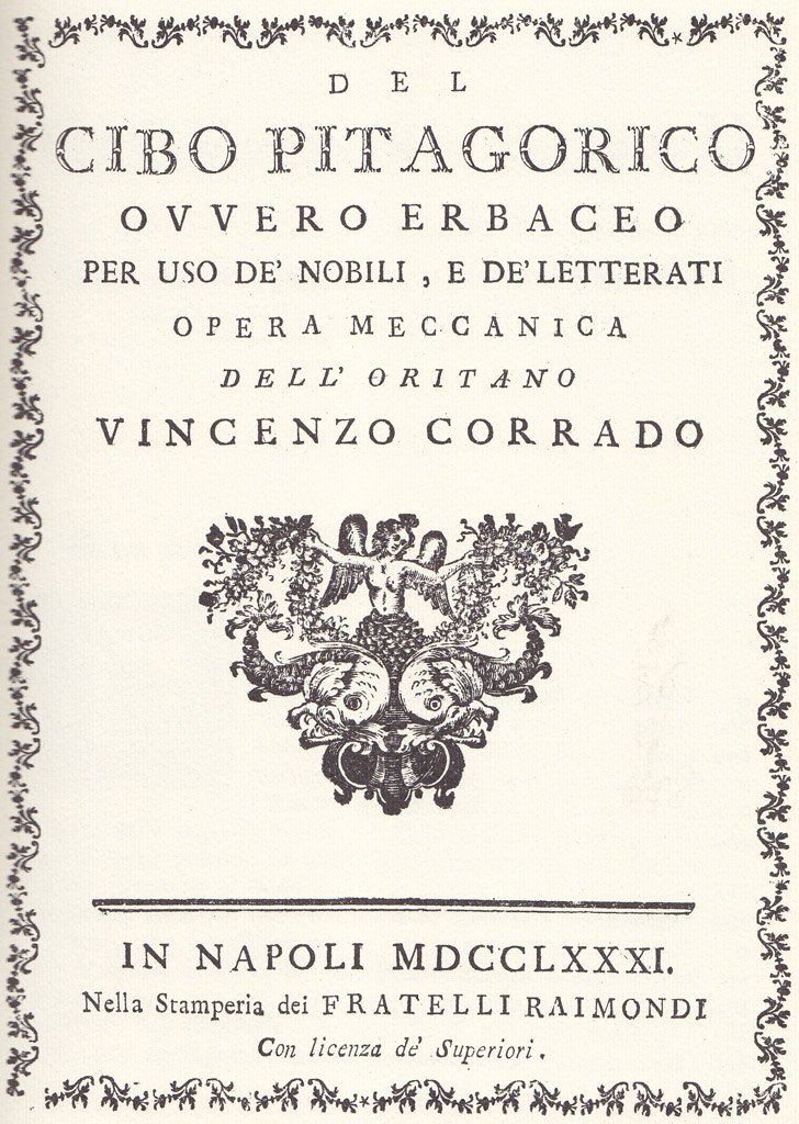 copertina tratta dall'antico libro del 1800 scritto da Vincenzo Corrado sul cibo vegetariano